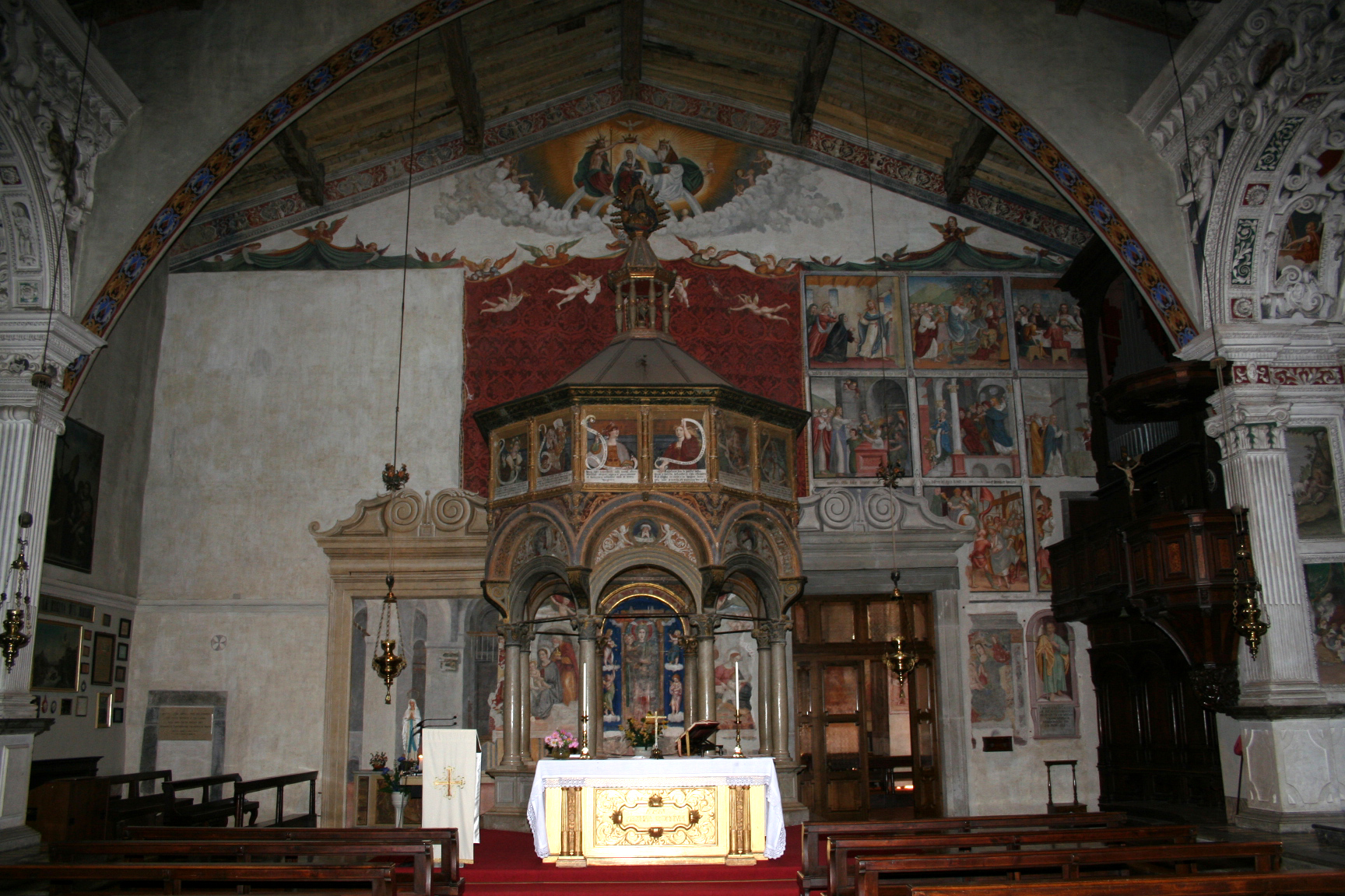 Tempietto che conteneva l'altare nel Santuario Madonna del Castello di Almenno San Salvatore